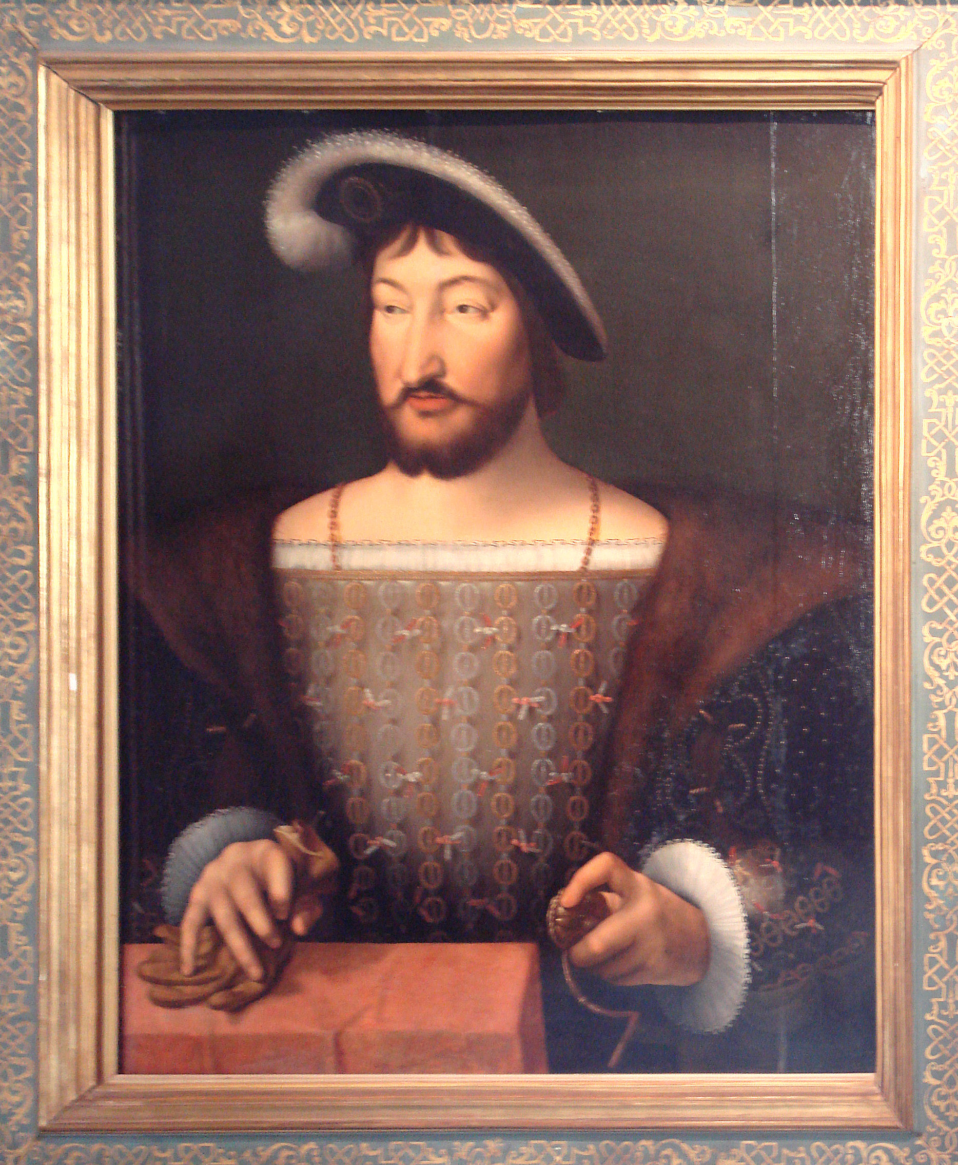 Francis I